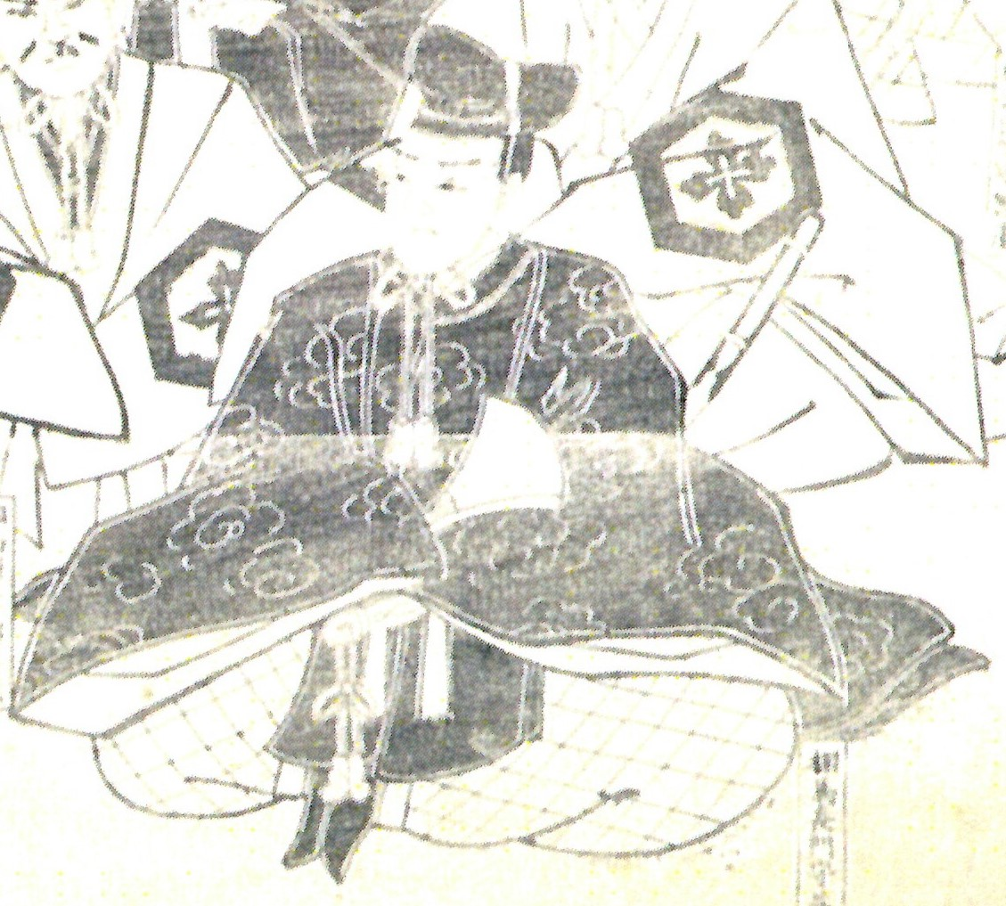 相馬益胤の画像(「相馬家歴代藩主像」より)。